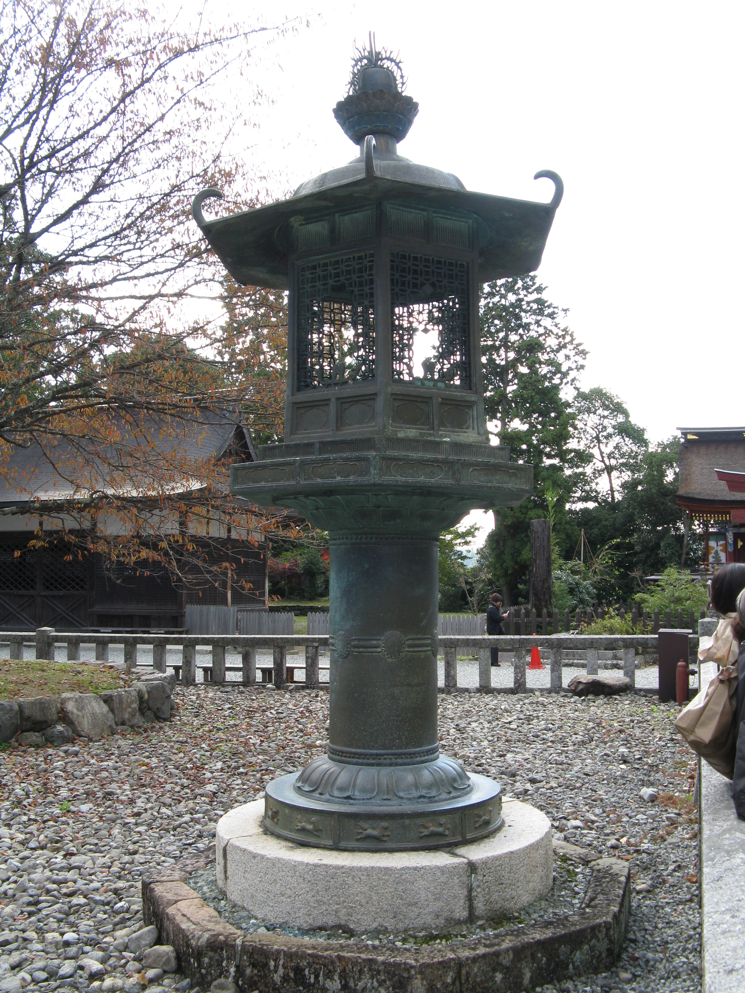 金峯山寺 銅灯籠